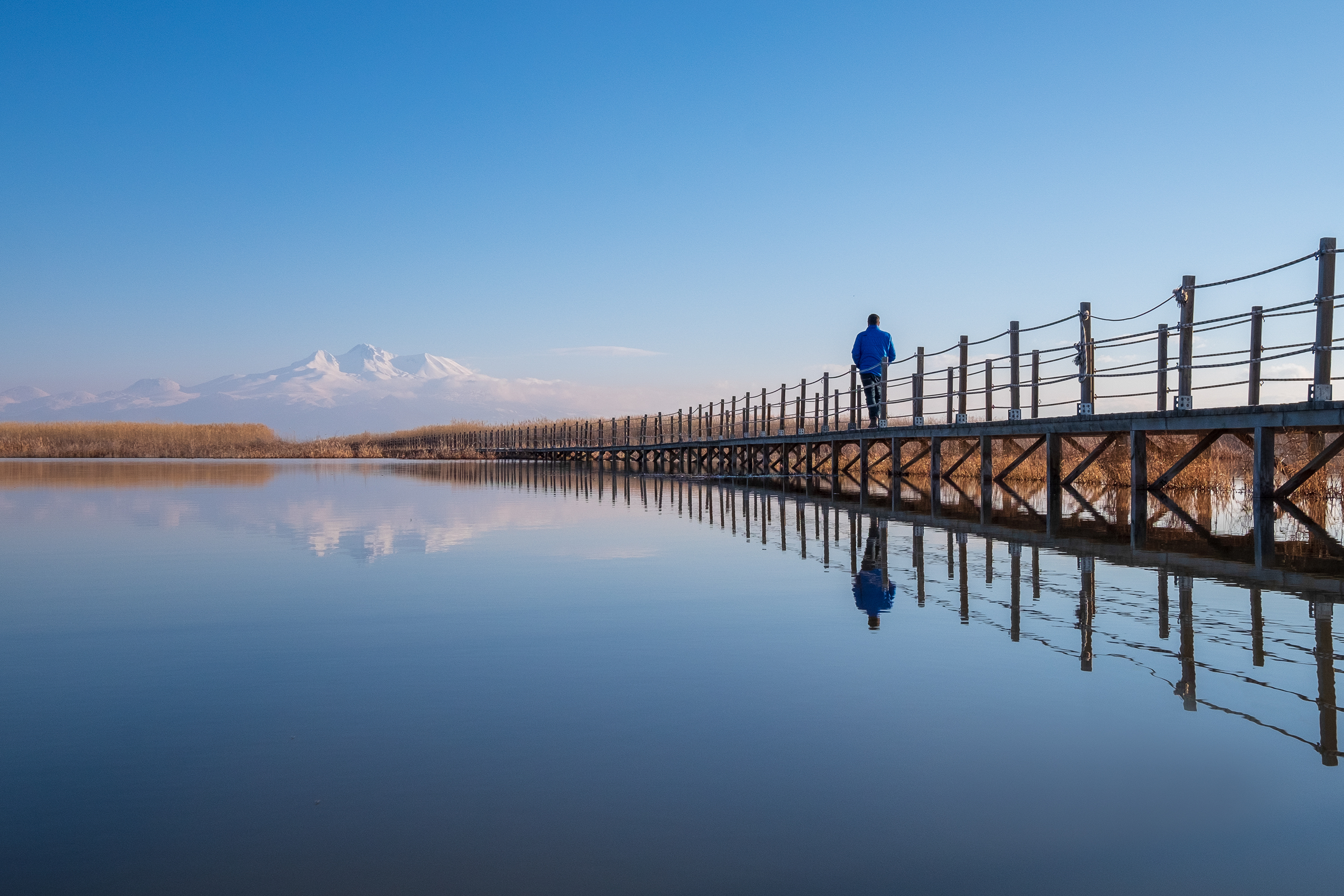 Sultan Sazlığında girişindeki köprü